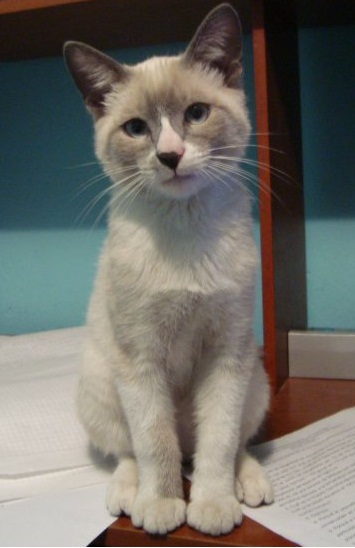 Foto de cuerpo entero de un gato casero